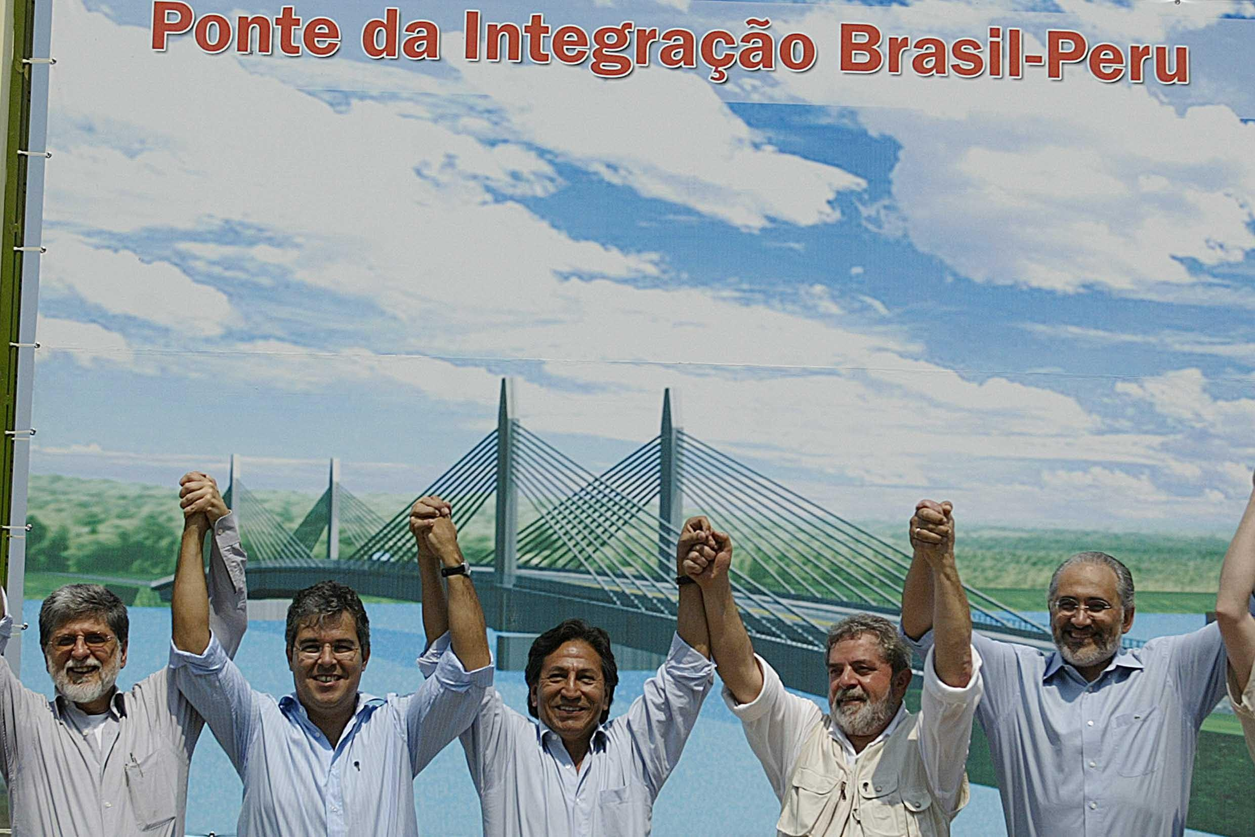 Da esquerda para a direita: ministro Celso Amorim (Relações Exteriores do Brasil), presidente Luís Inácio Lula da Silva (Brasil), presidente Alejandro Toledo (Peru), presidente Carlos Mesa (Bolívia) e Jorge Viana (governador do Acre) na solenidade de lançamento da pedra fundamental das obras da Ponte da Integração Brasil-Peru, ligando as cidades de Assis Brasil (Acre) e Iñapari (Peru).